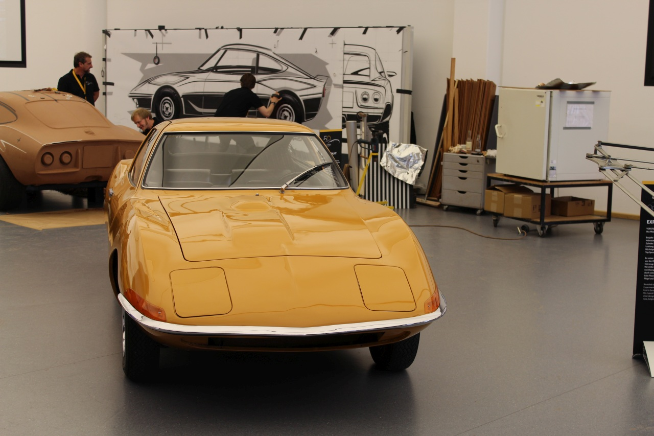 zu Besuch um Opel Designzentrum, Rüsselsheim